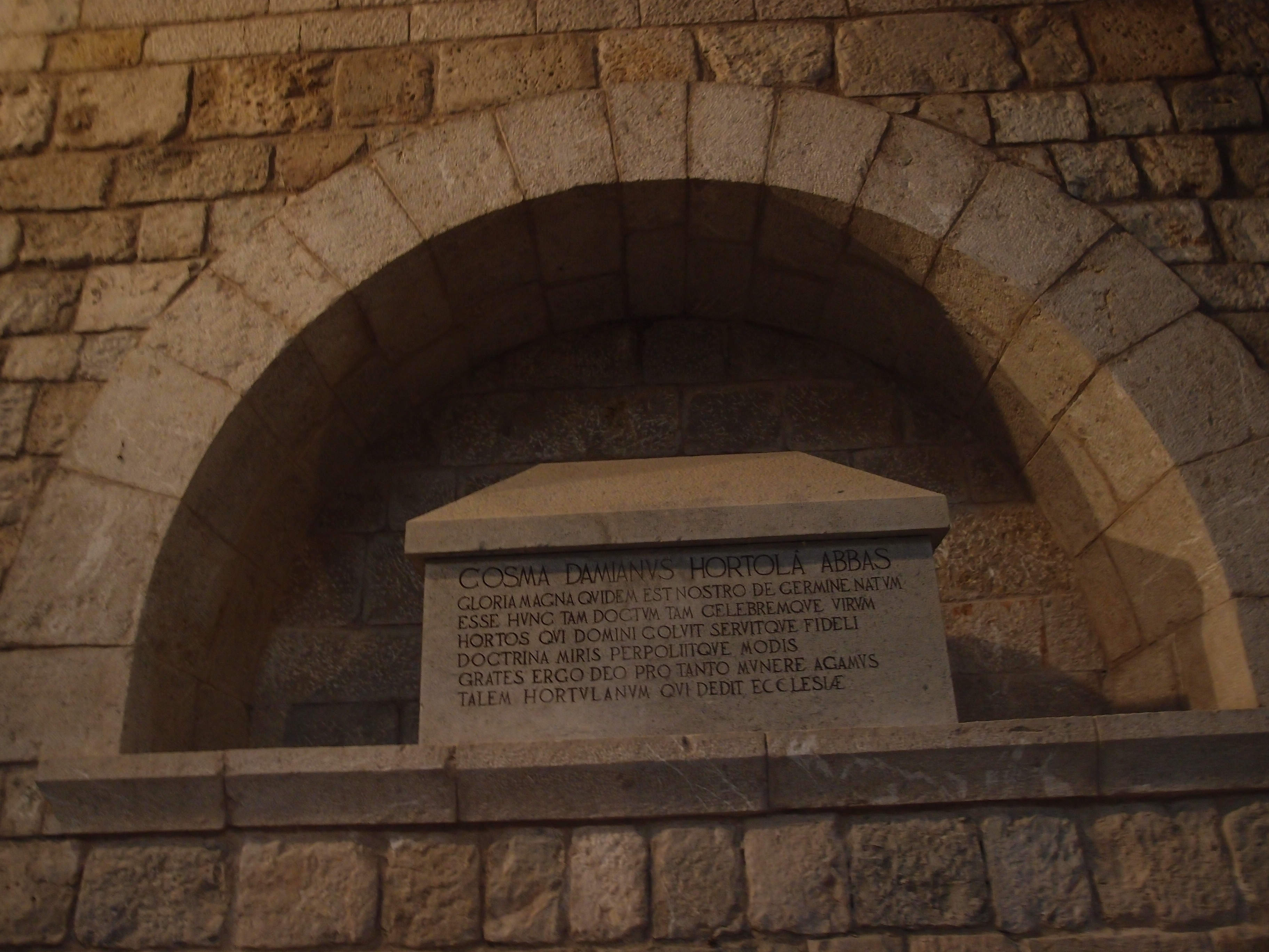 Kloster Santa Maria de Vilabertran (Alt Emporda / Katalonien) Datum: 15.09.2013 Urheber: M. Pfeiffer alias Benutzer:Gordito1869 Quelle: privates Fotoarchiv des Urhebers